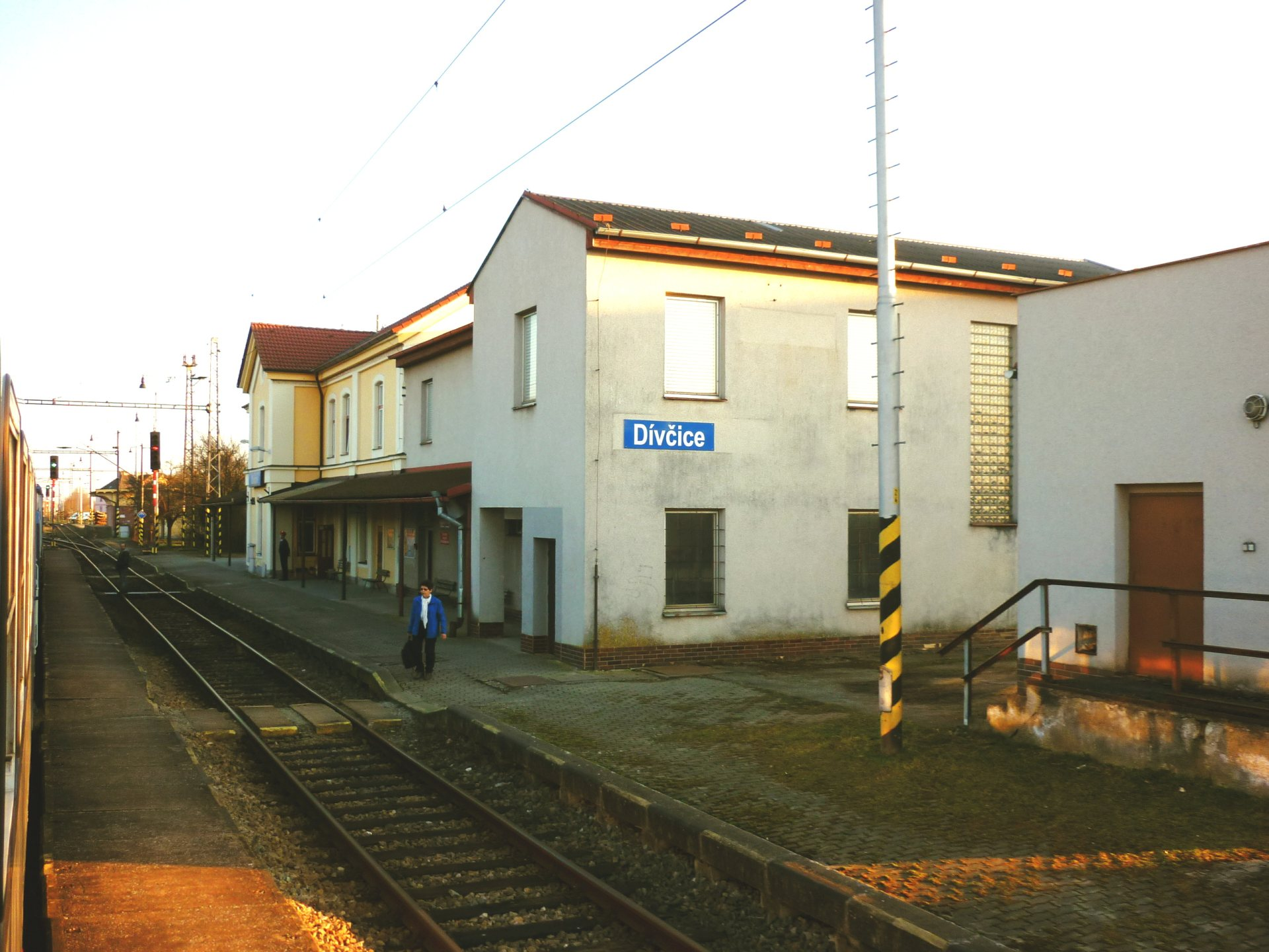 Dívčice - železniční stanice